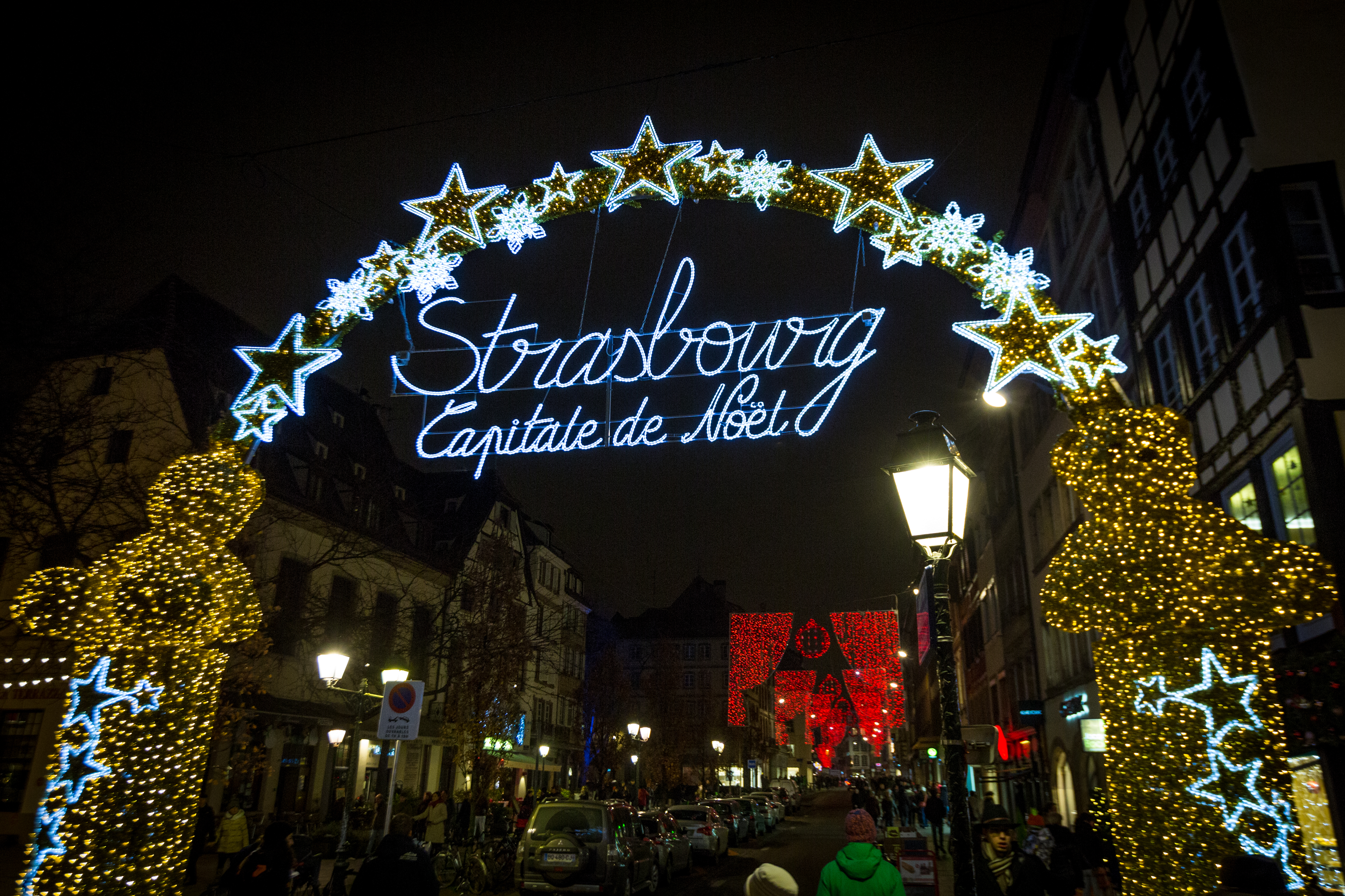 Strasbourg capitale de Noël rue du Vieux Marché aux Poisson